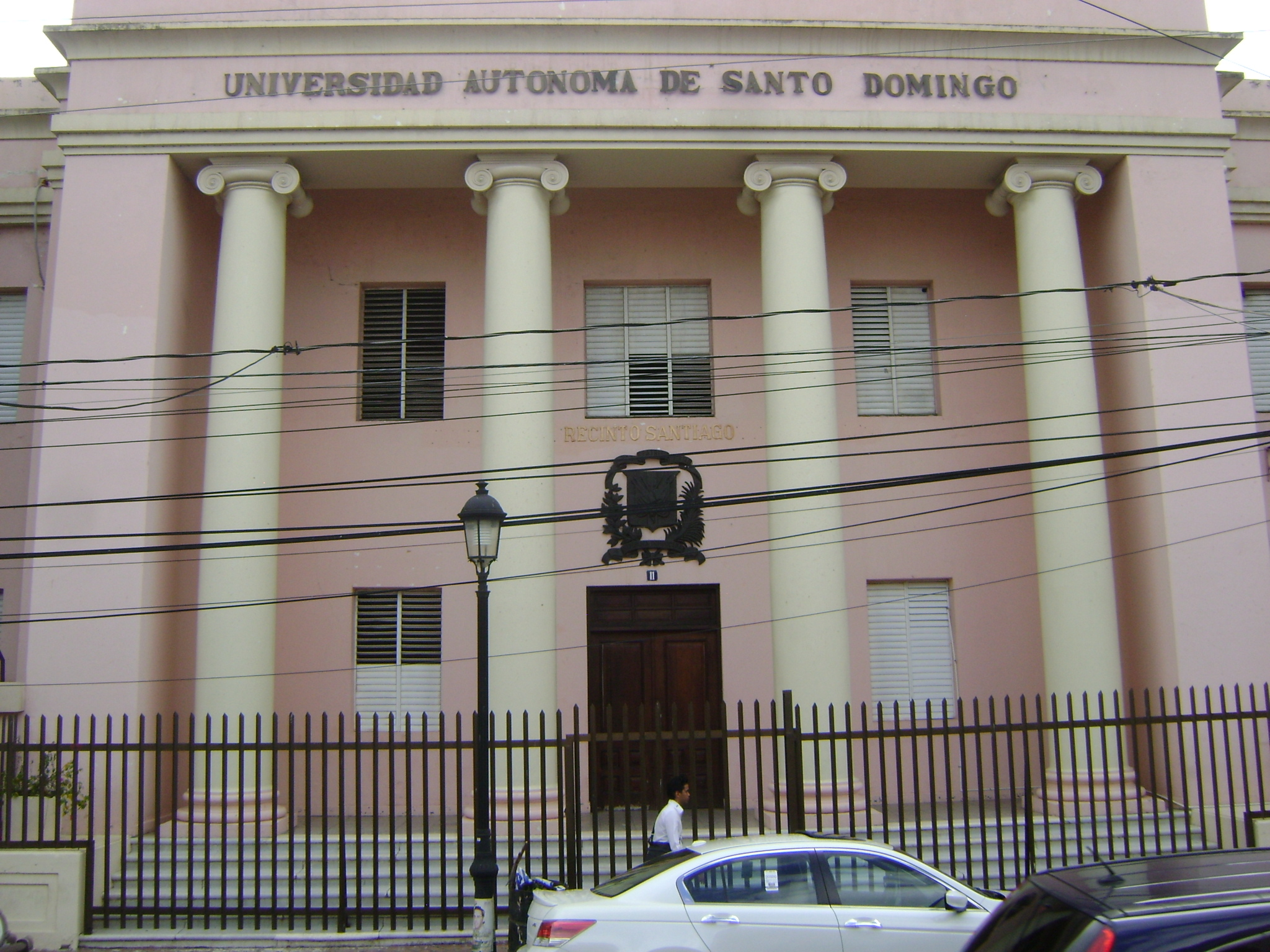 Universidad Autonoma de Santo Domingo, in Santiago de los caballeros.